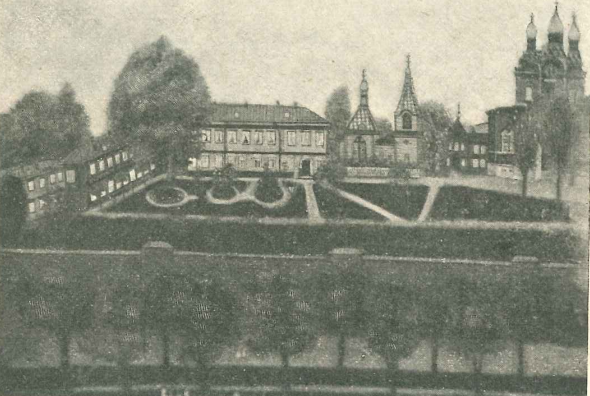 Общий вид Казанского Головинского монастыря в 1912 году